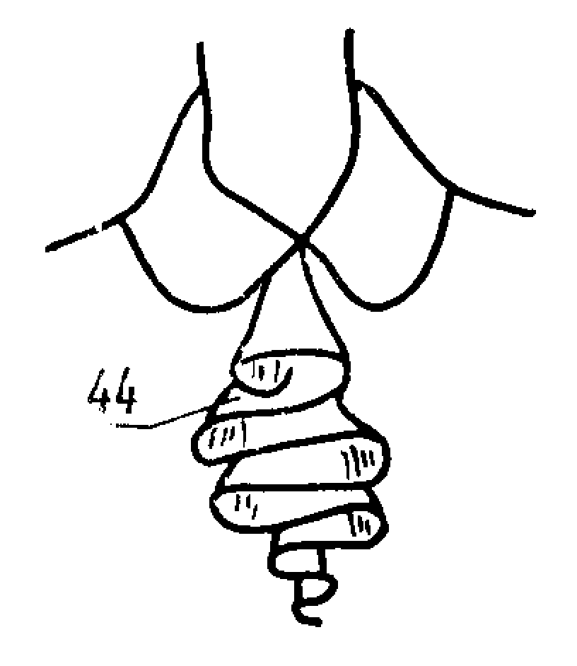 Изображение из ГОСТ 22977-89 (СТ СЭВ 6484-88) — Детали швейных изделий. Термины и определения.